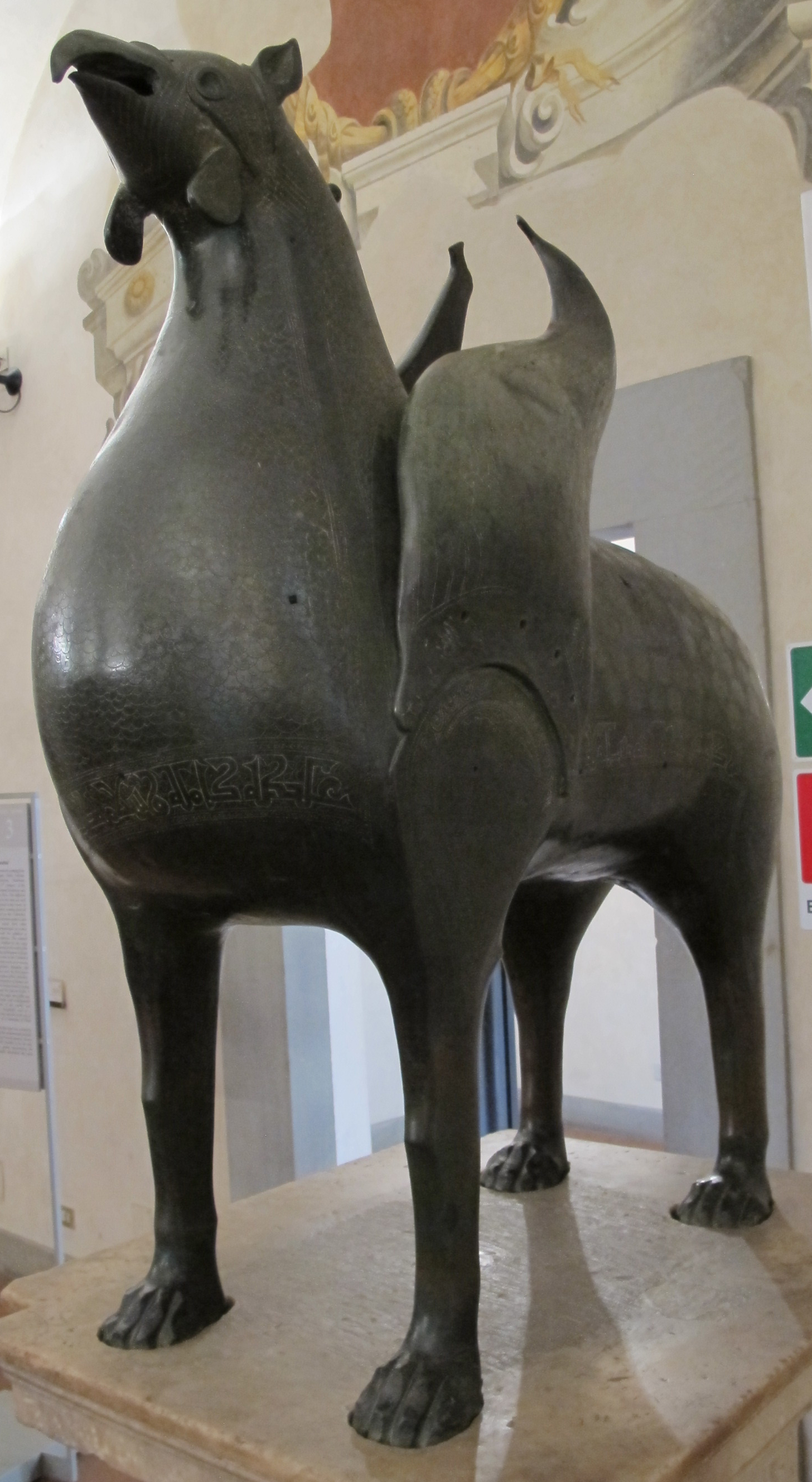 Arte islamica, ippogrifo, XI sec